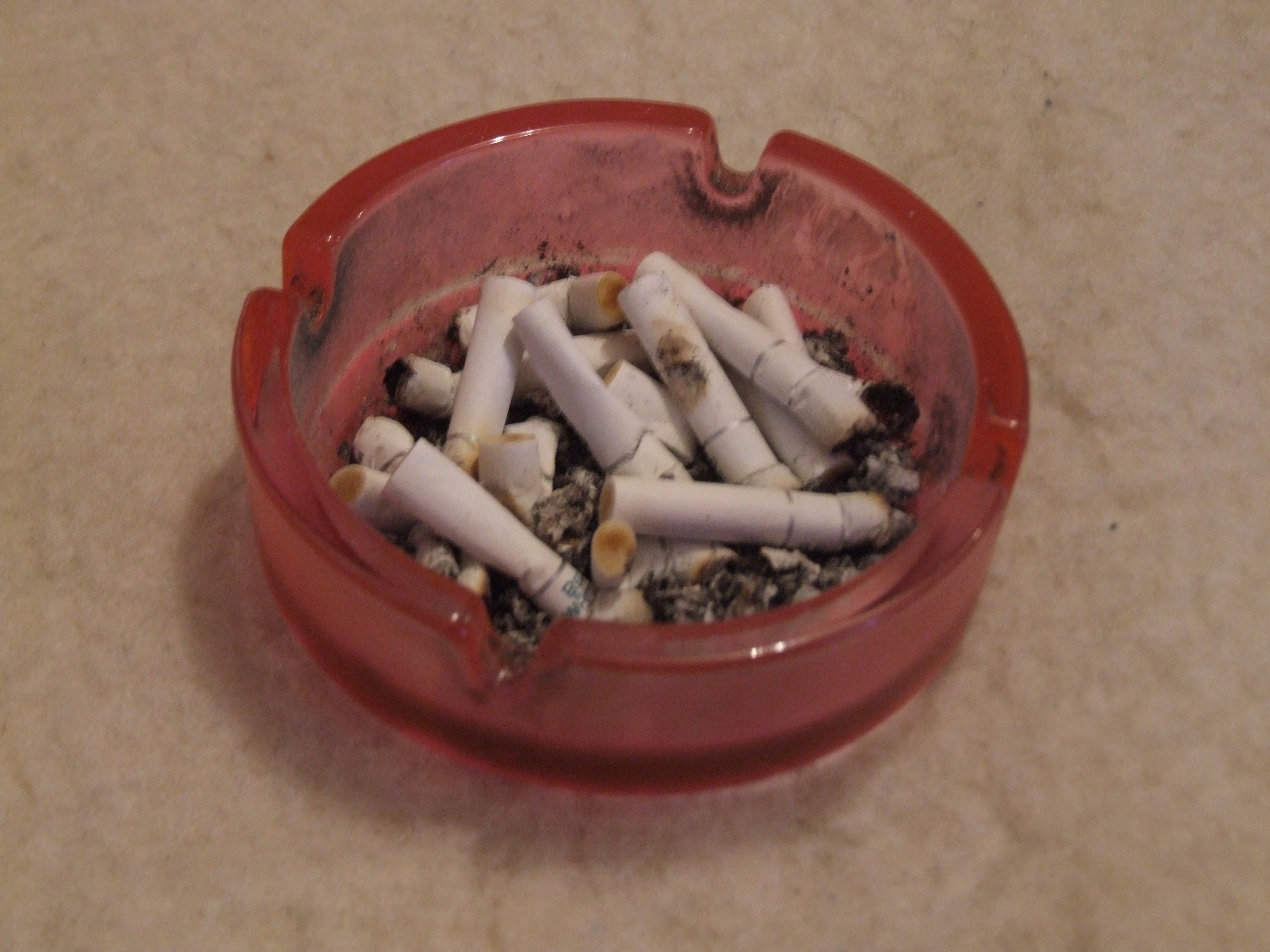 Popielniczka Wikipedysty Joymaster po pracy